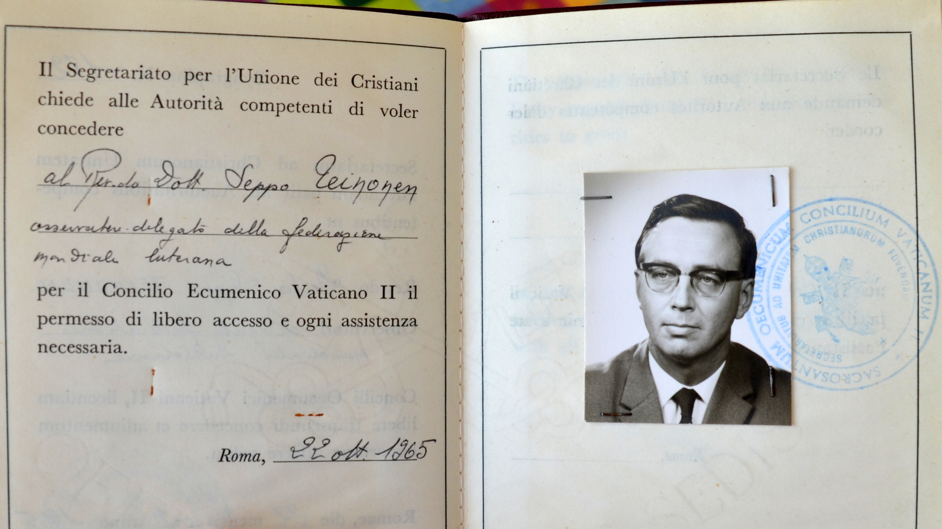 Osallistujapassi Luterilaisen maailmanliiton tarkkailijana Vatikaanin toiseen kirkolliskokoukseen 1965.